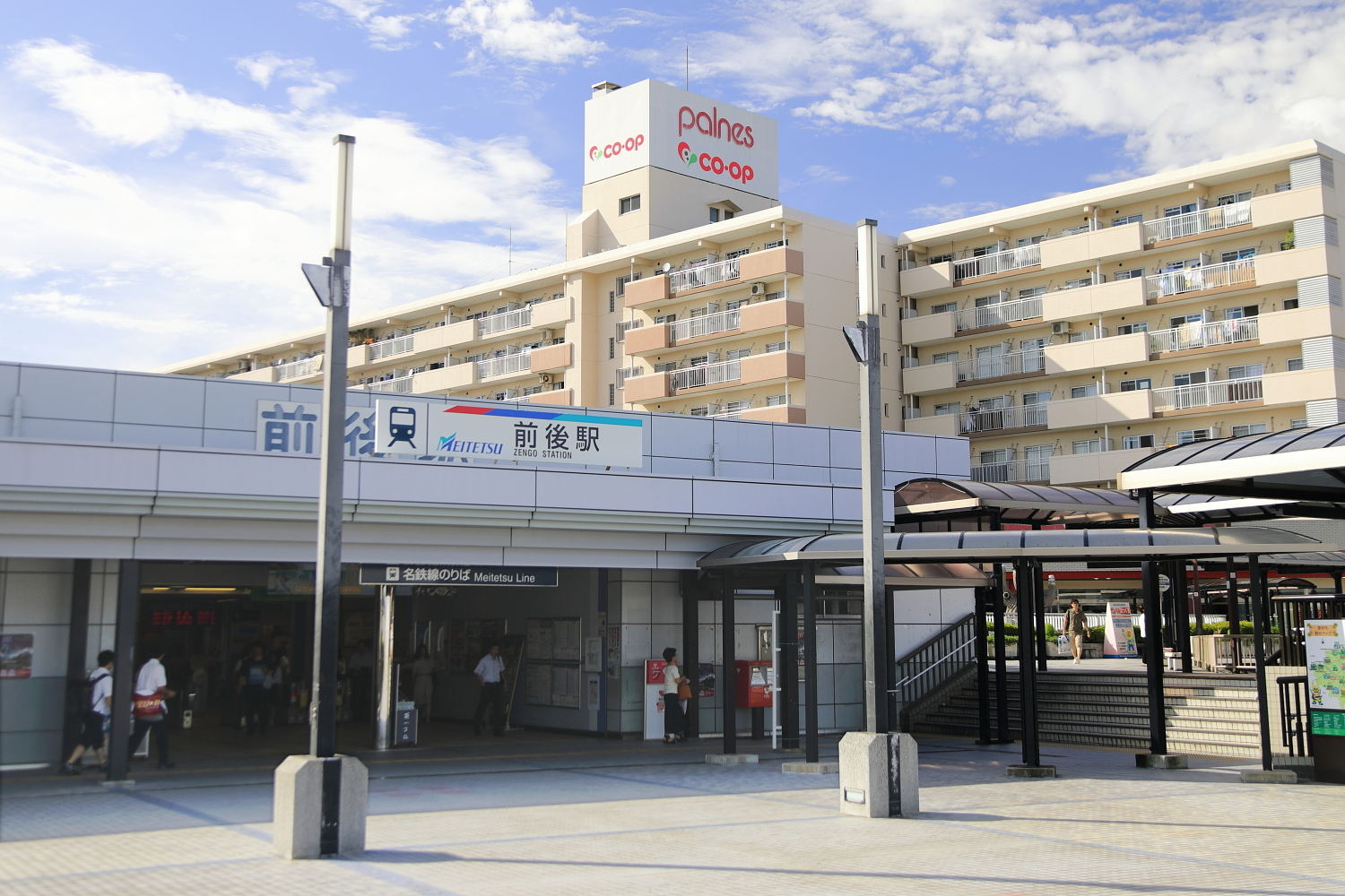 前後駅改札口およびパルネス前後（2018年（平成30年）7月）